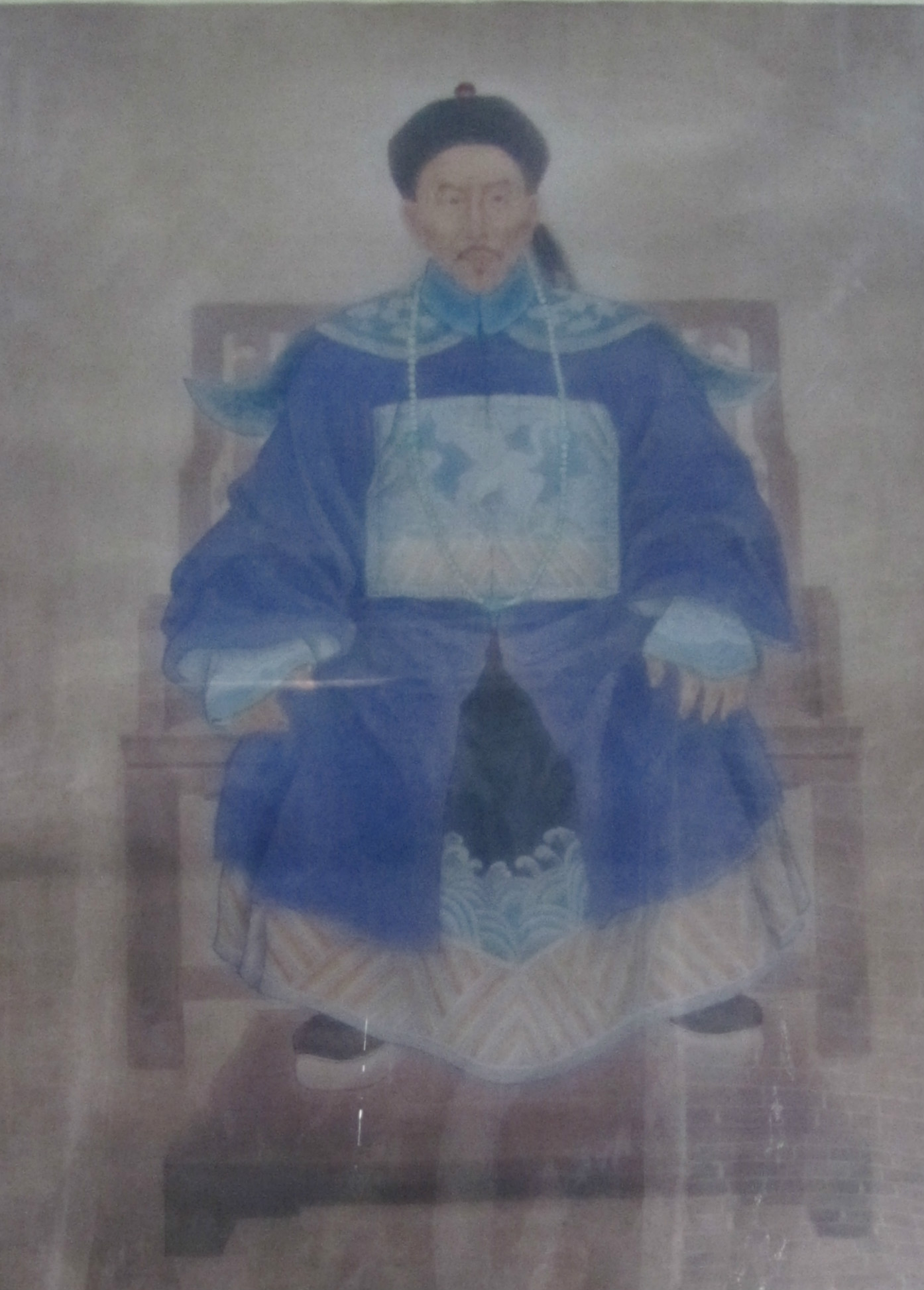 中文（中国大陆）: 彭玉麟故居的画像